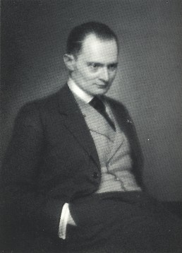 Porträt des Fliegers Günther von Hünefeld.